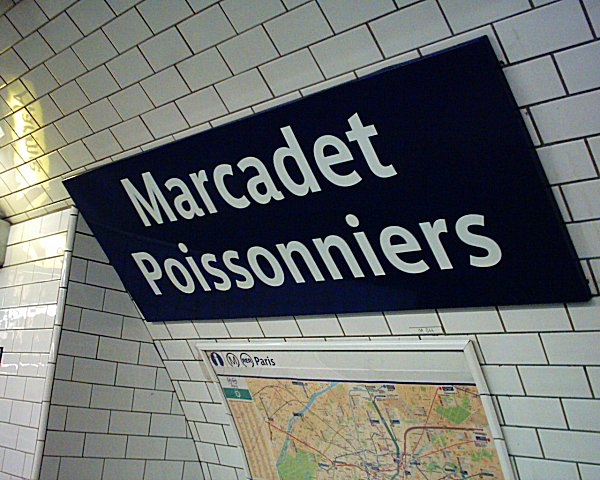 Plaque de la station Marcadet du Métropolitain de Paris.